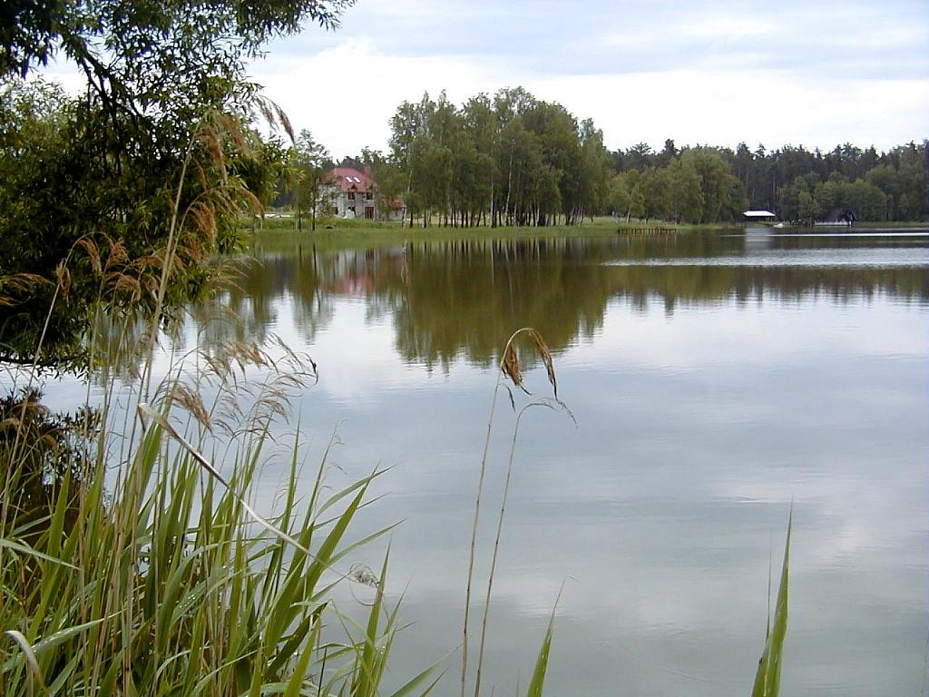 Ataru ezers 2002-06-01